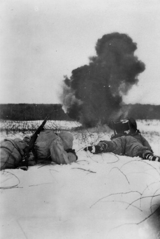 Russland, Einschlag feindlicher Artillerie Scherl Bilderdienst Unmittelbar vor Störungsuchern der Nachrichtenabteilung der Division "Grossdeutschland" liegt der Einschlag der feindlichen Artillerie. PK-Aufnahme: Kriegsberichter Göttert 9.3.44 [Herausgabedatum]